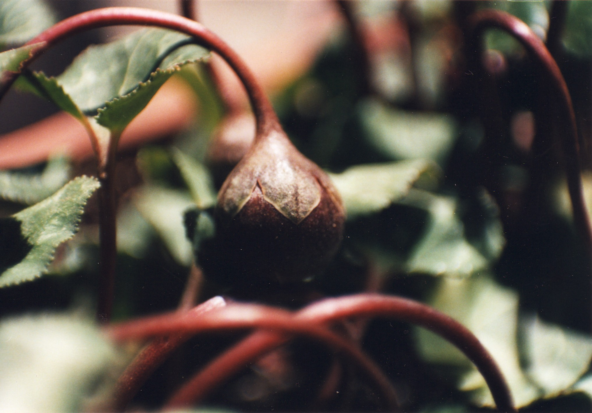 Frutto di Cyclamen (ibrido F1 da giardino)